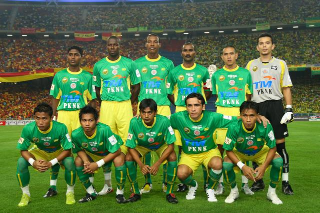 Pasukan Bola Sepak Kedah 2015